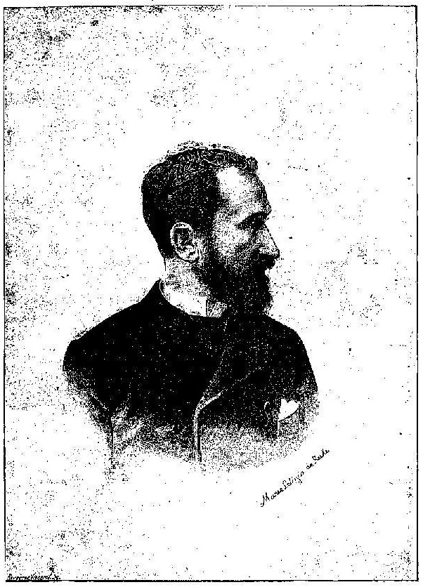 Retrato de Luis de Rute firmado por María Leticia de Rute. Ilustración de La Sierra-Nevada, separata de la Nouvelle revue internationale, París, mayo-junio de 1889